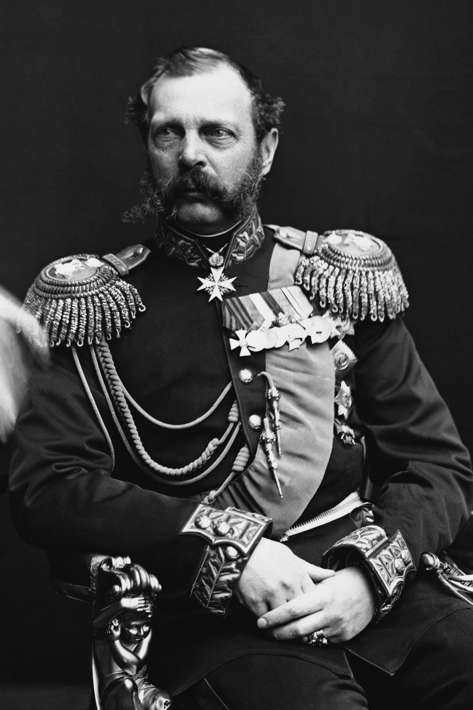 Alexander II of Russia (1878 or 1881).